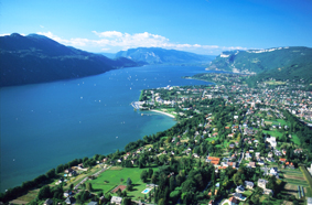 Aix-les-Bains et le lac du Bourget. Plus grand lac naturel de France.